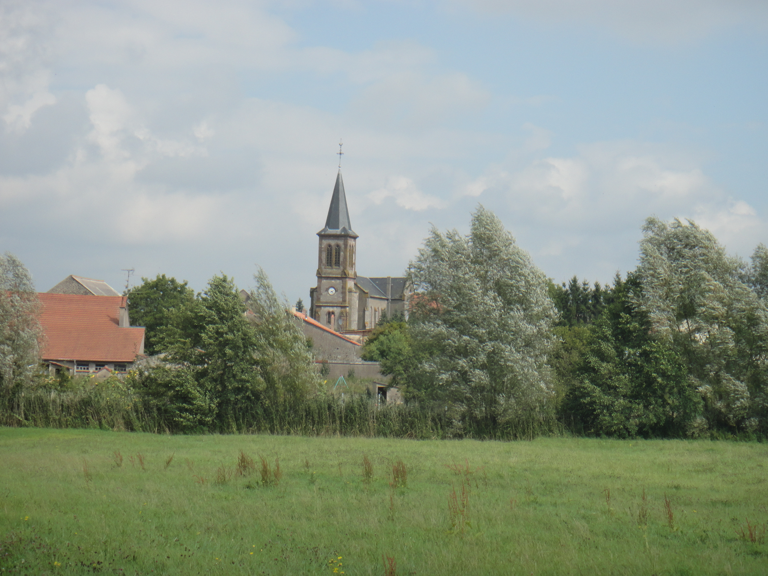 Vue du village de Réning, Moselle (France)